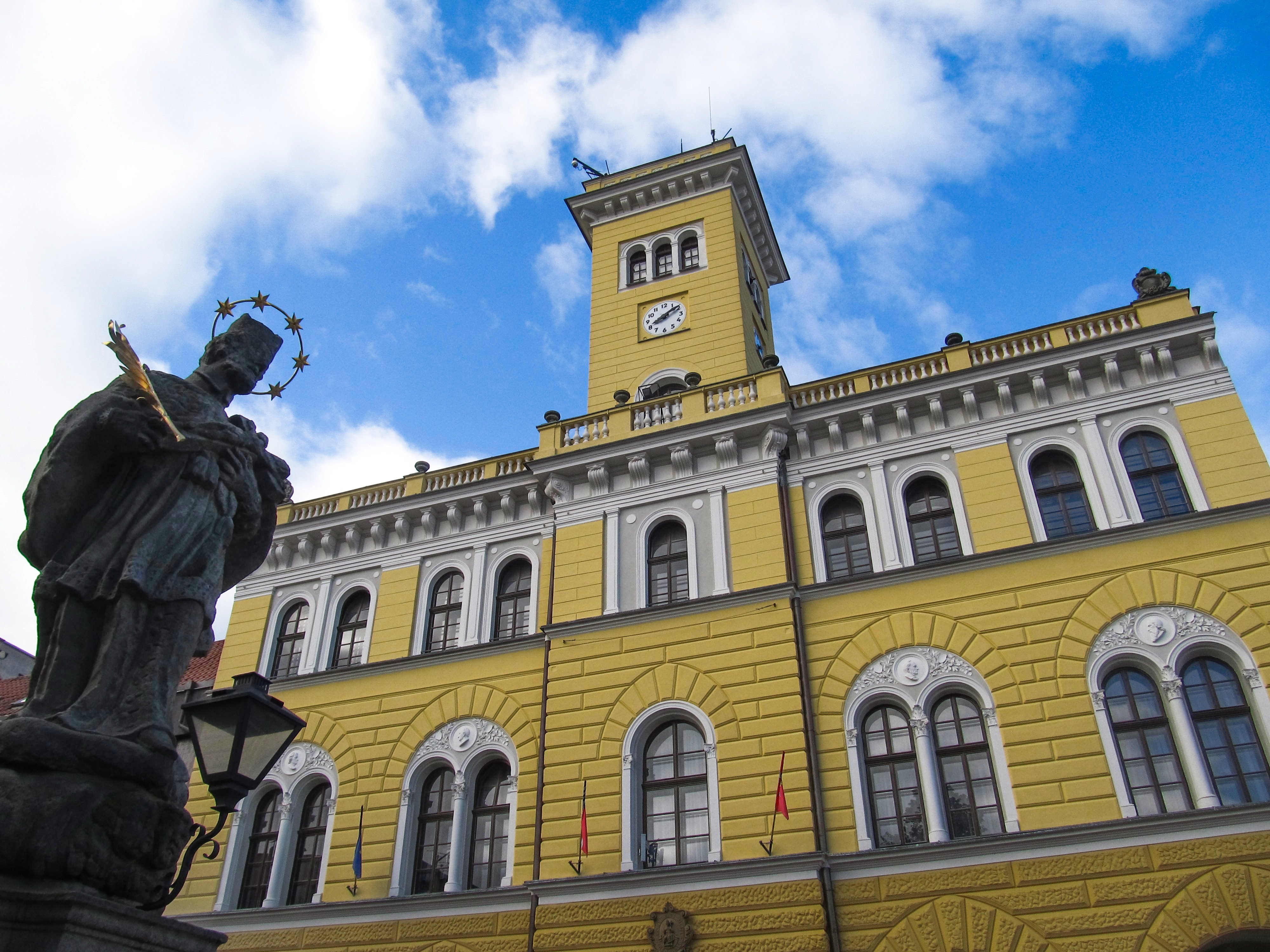 Socha sv. Jana Nepomuckého a radnice na Náměstí Míru